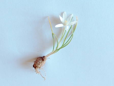 Preparato botanico di Ornithogallum biflorum raccolto in Sardegna con particolare dell'habitus e del bulbo.